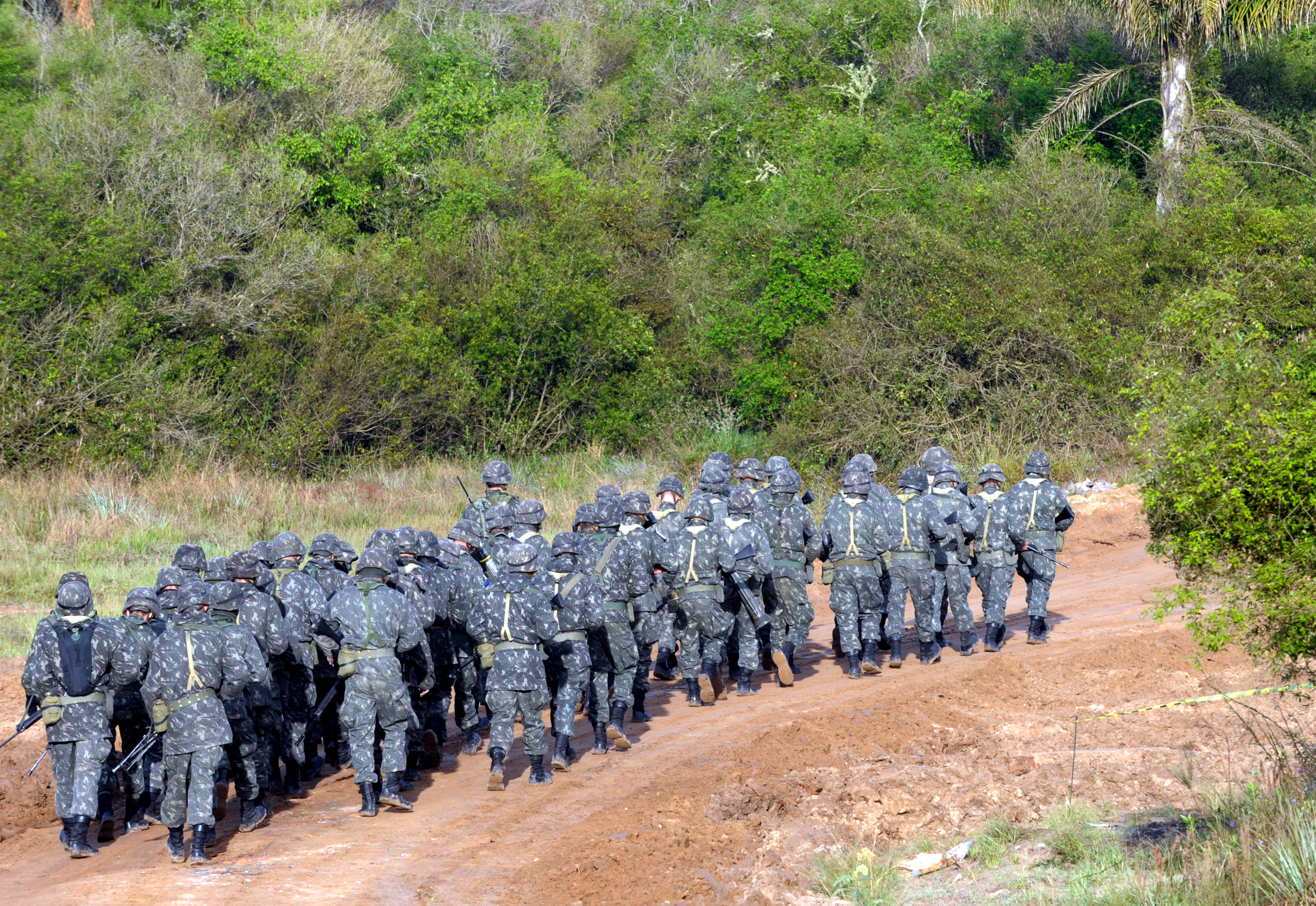 Fotos: Jorge Cardoso